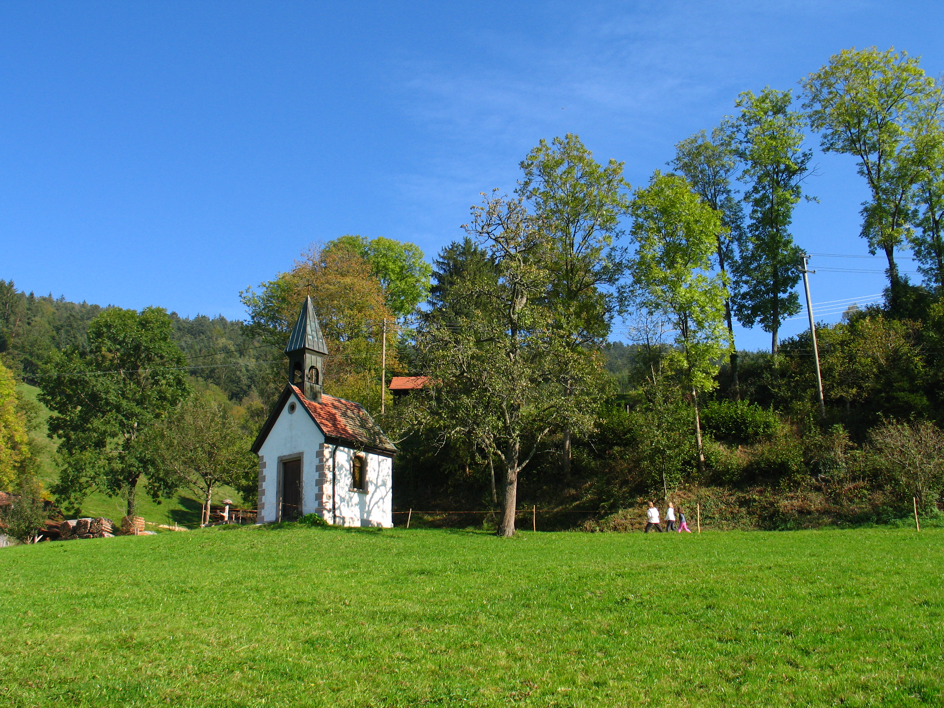 Hofkapelle in Oberried-Weilersbach